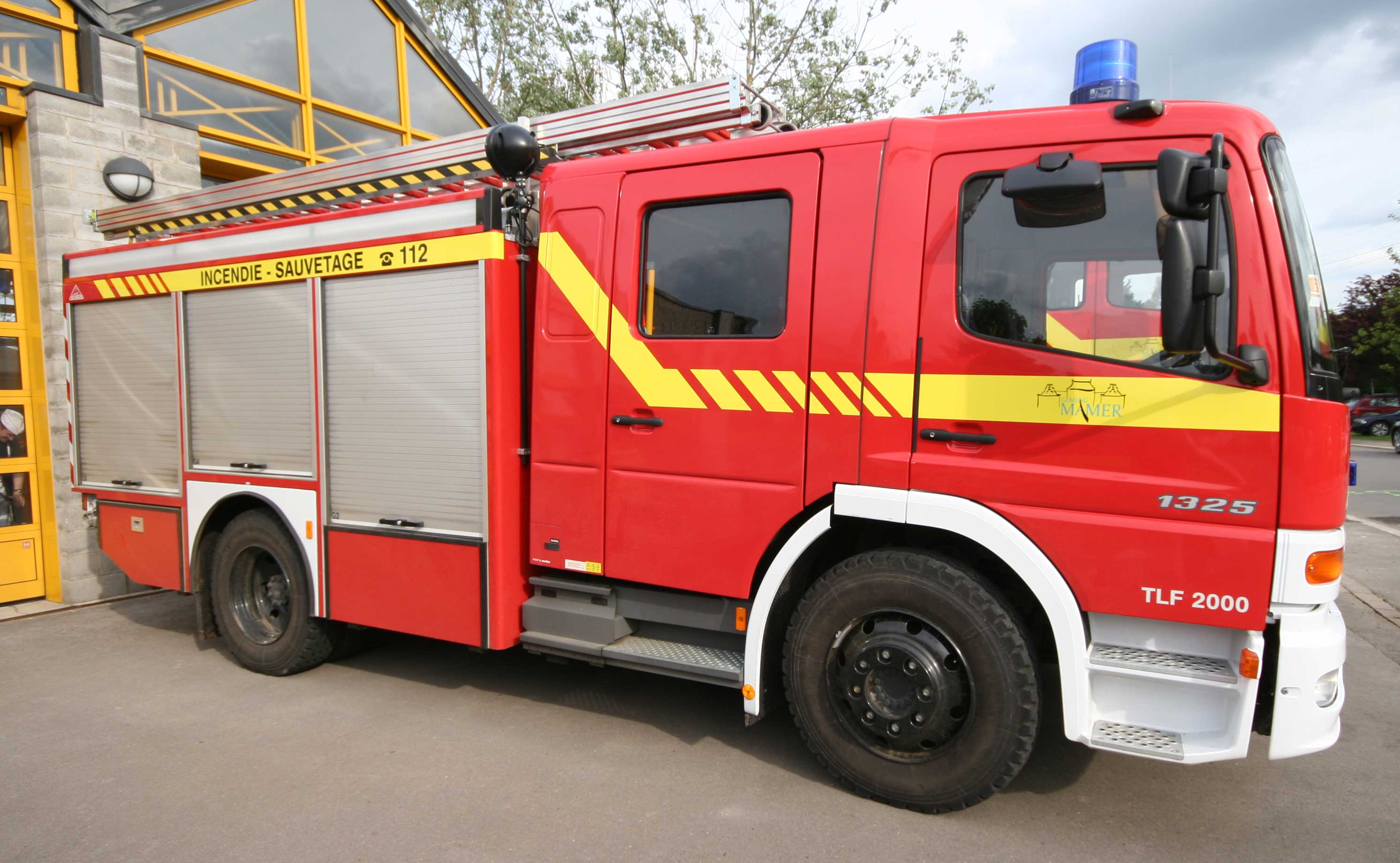 Pomp Mam TLF 2000.